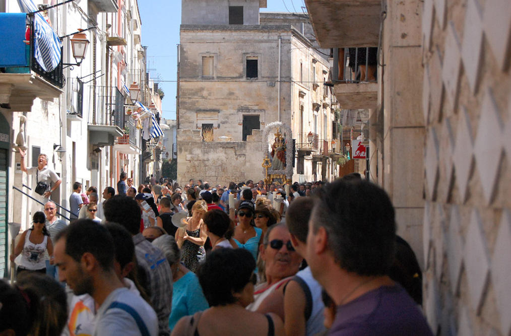 Capurso Summary Processione dei grandi ceri, festa della Madonna del Pozzo 08 a Capurso in provincia di Bari